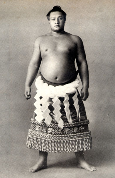 the 35th Yokozuna Futabayama Sadaji（第35代横綱 双葉山定次）